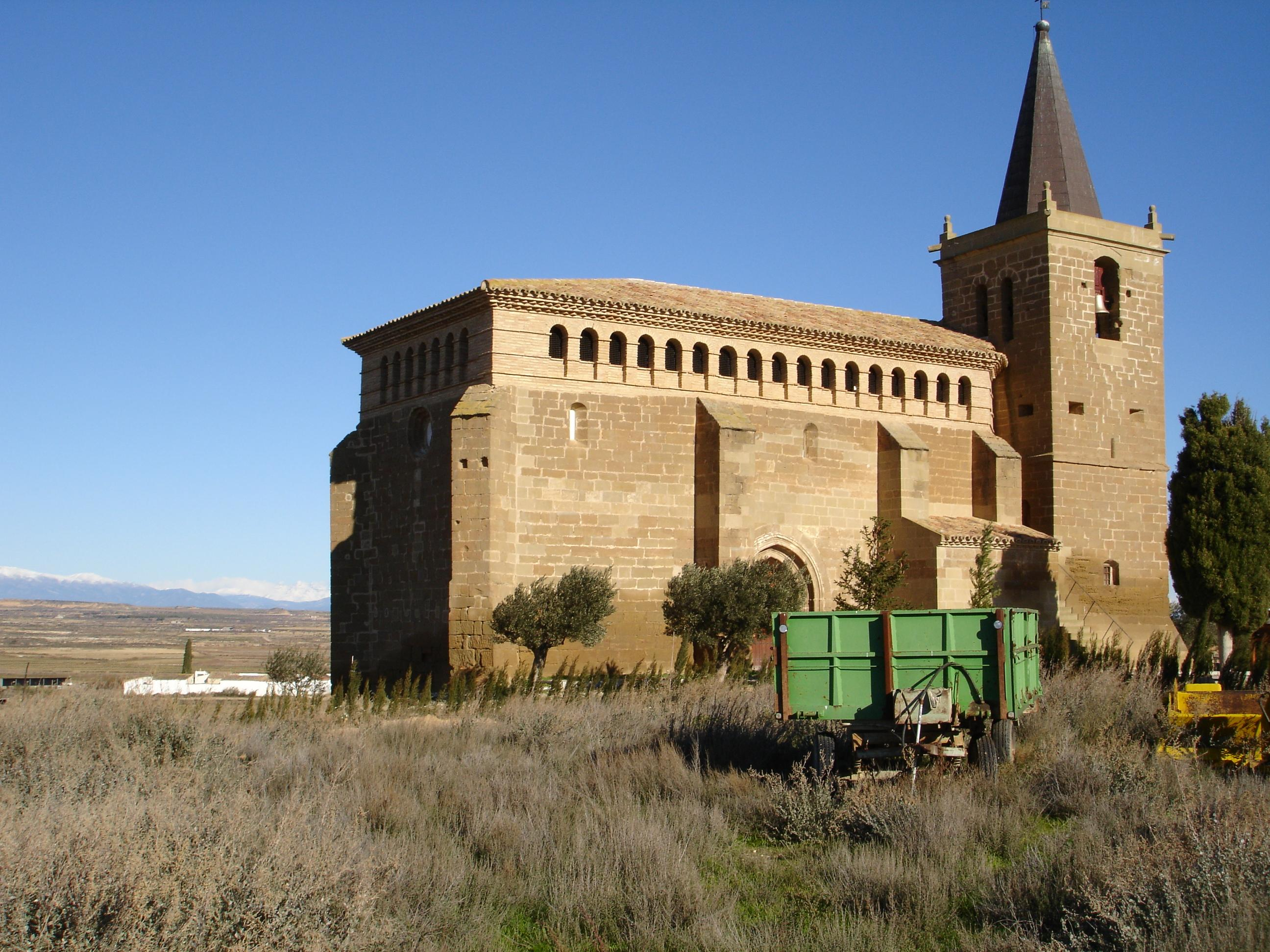 Vista de la iglesia de San Juan Bautista de Capdesaso (los Monegros, Huesca) con el cementerio y la Sierra de Guara y el Monte Perdido en el horizonte